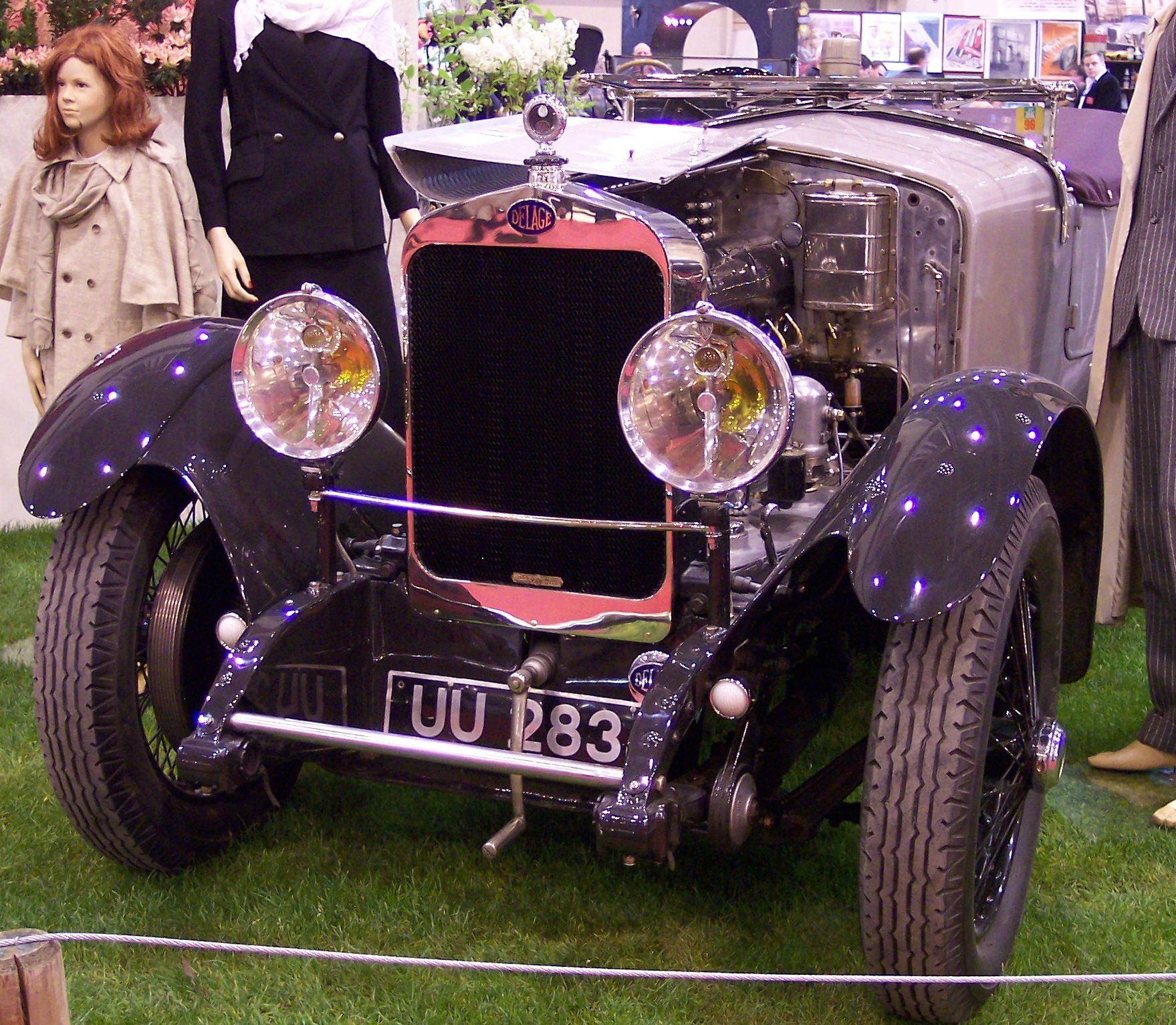 Delage